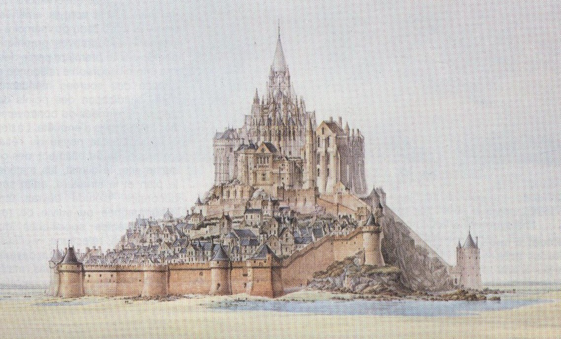 peinture de Édouard Corroyer présantnant le Mont_St-Michel